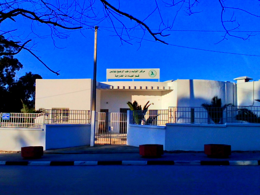 Tunis, Tunisie تونس العاصمة ، تونس